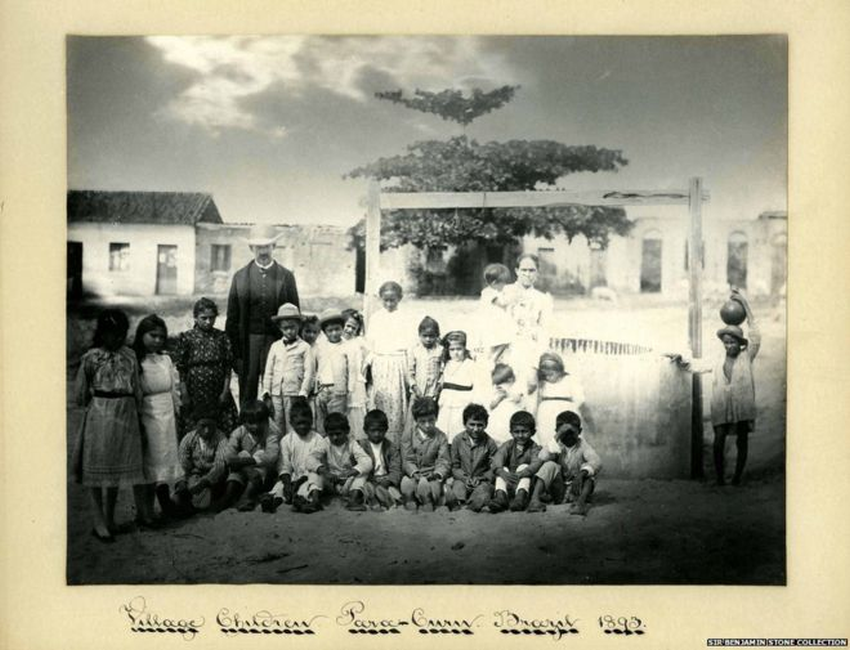 Moradores de Paracuru. Registro do fotógrafo britânico John Benjamin Stone em sua viagem ao Brasil para acompanhar o eclipse solar de 1893.